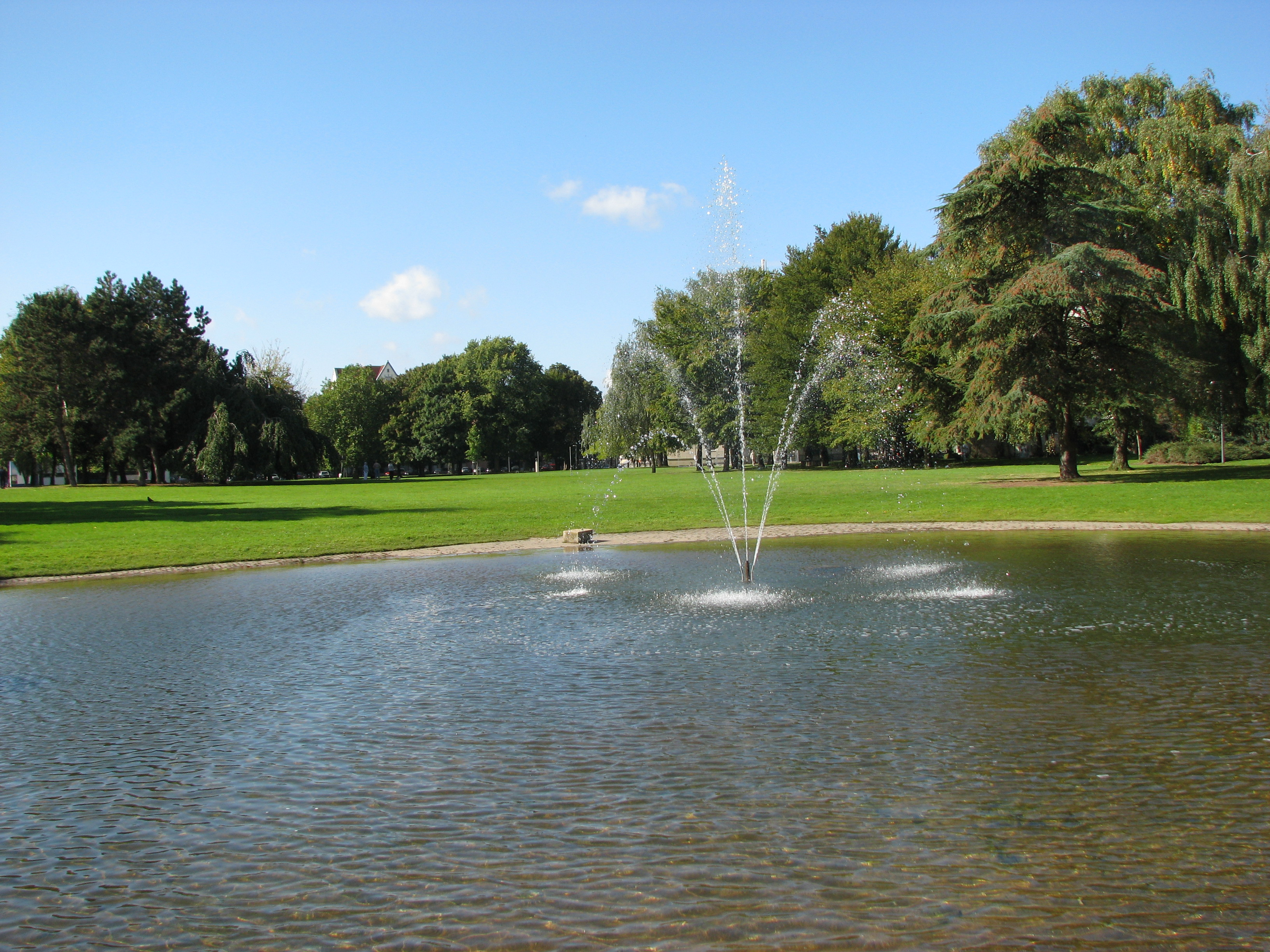 Fontäne im Kennedypark in Aachen